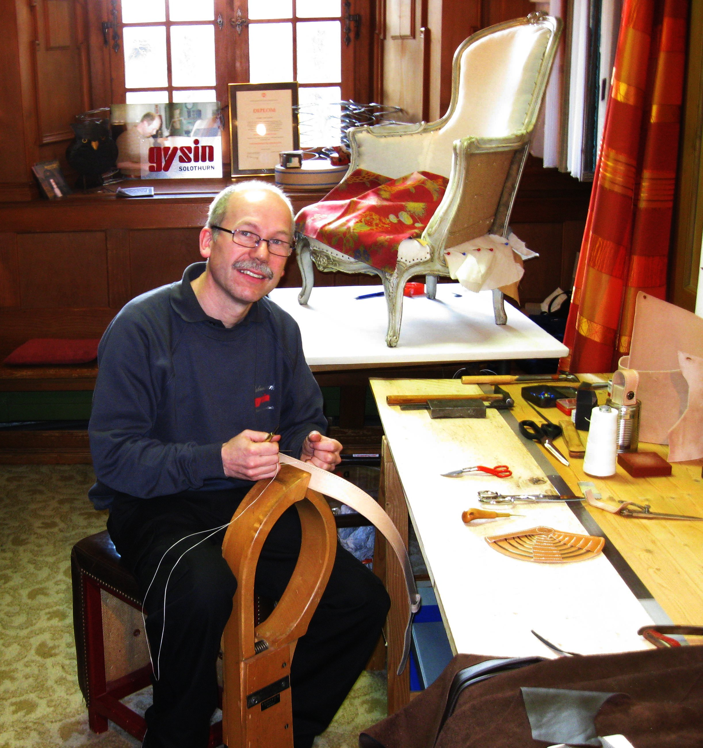 Sattler am Nähen eines Gurtes, Weihnachtsausstellung Kapuziner Kloster Solothurn